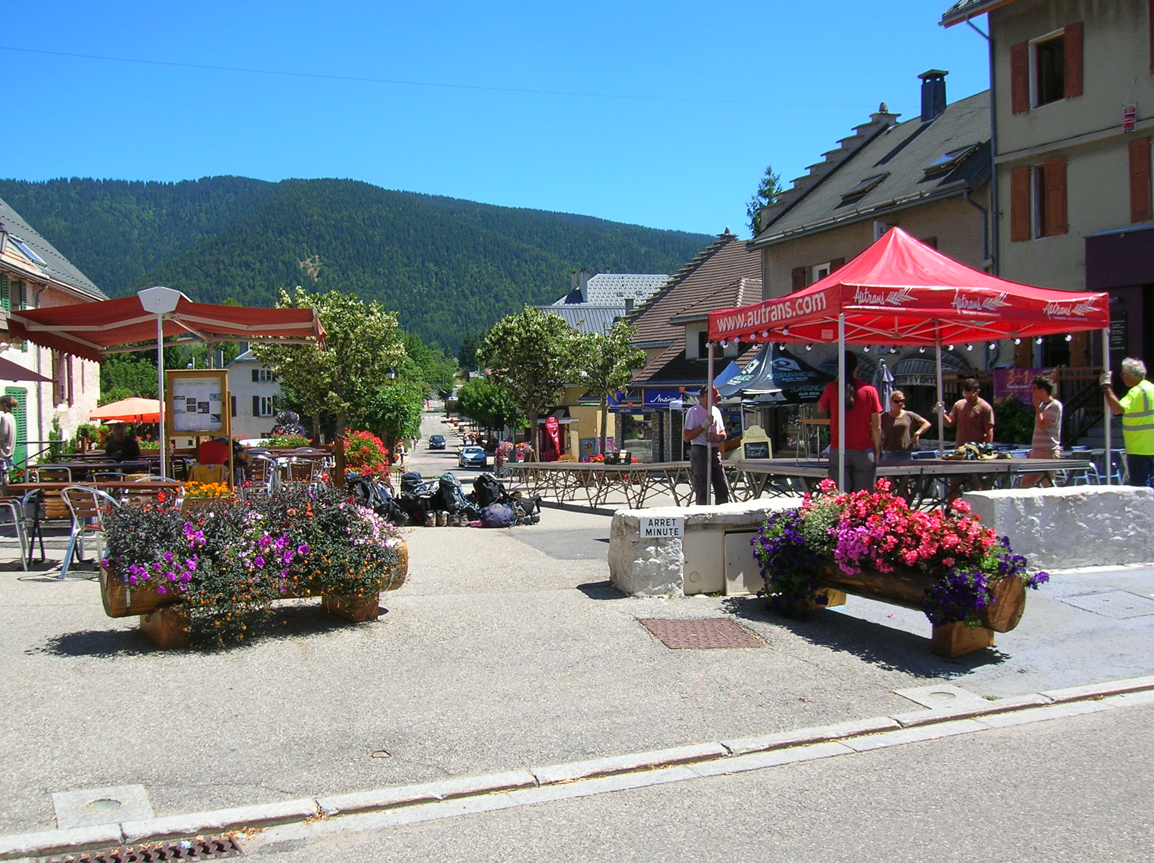 Autrans, Centre ville